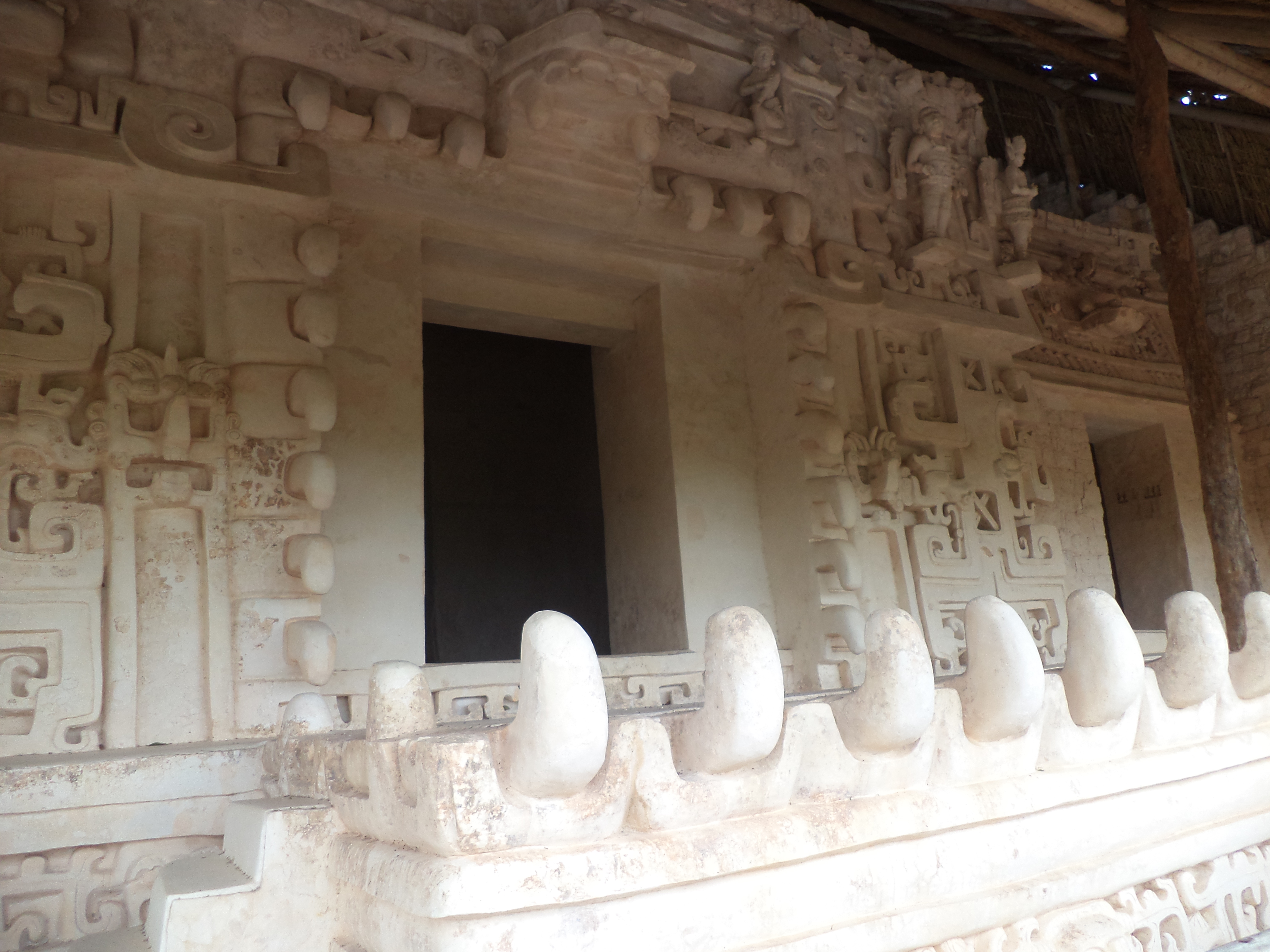 Ek Balam